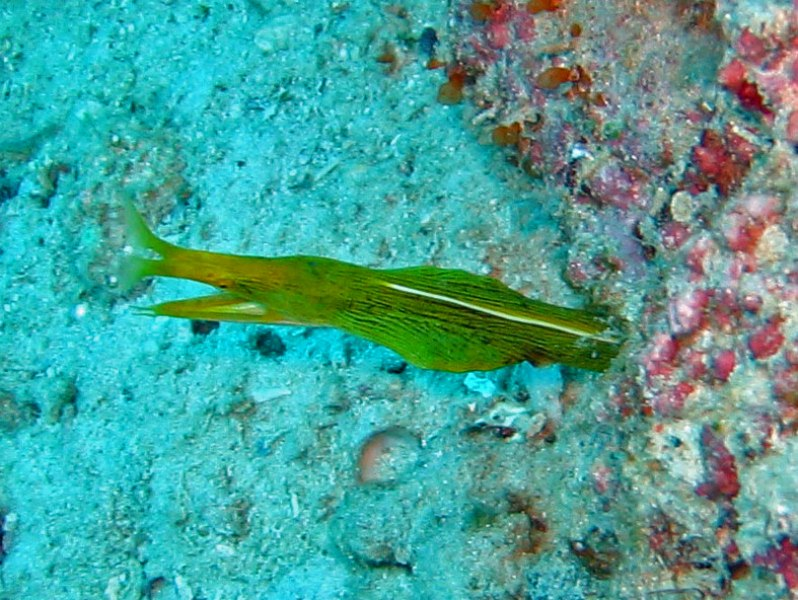 Muraenidae - Rhinomuraena quaesita. Female from Borneo